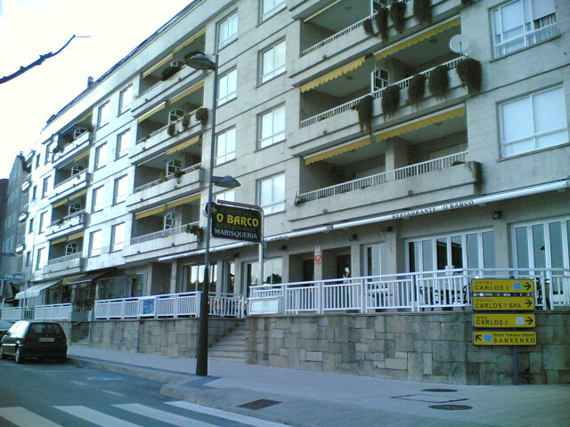 Rua de Sanxenxo, na Galiza. Street of Sanxenxo, Galicia, Spain.